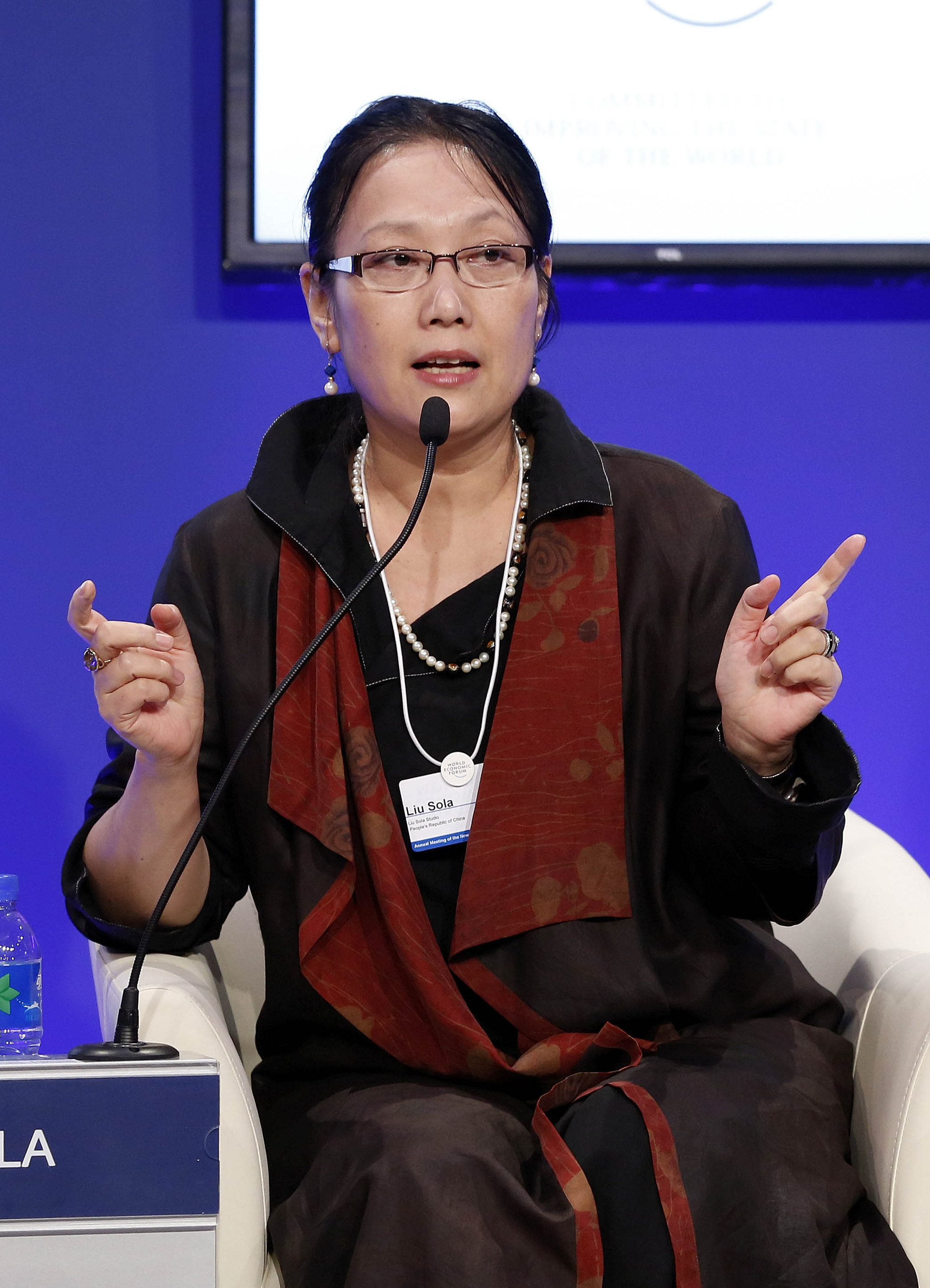 LiuSola